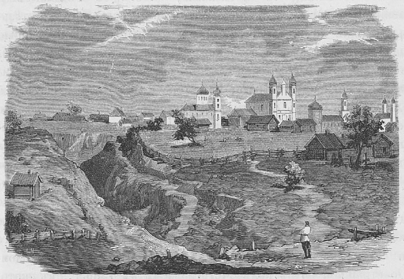 Беларуская (тарашкевіца): Амсьціслаў (Amścisłaŭ)